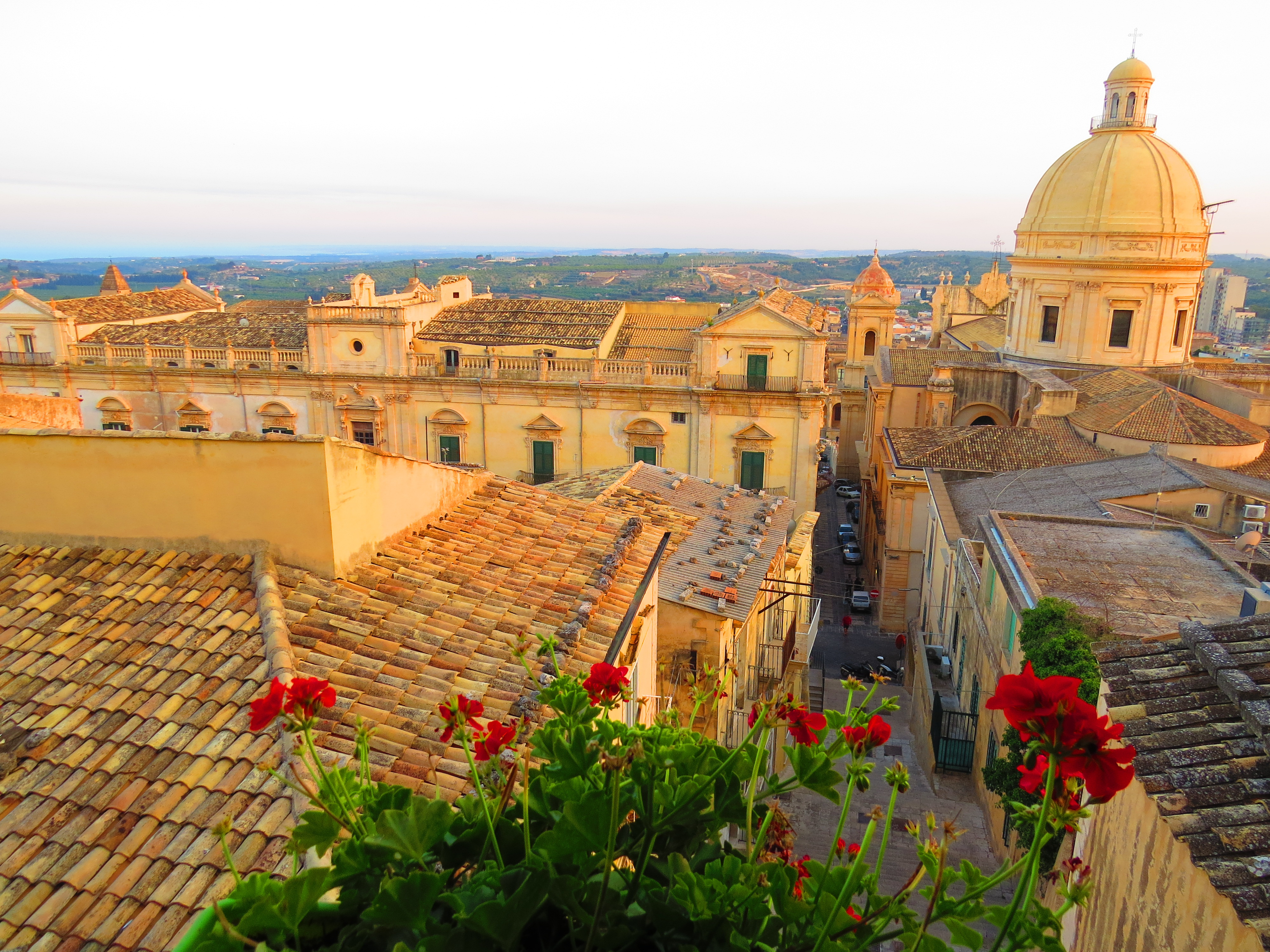 Barocco, Noto